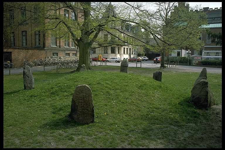 Runstenarna Dr270, Dr316, Dr317, Dr330, Dr331 och Dr337. Motiv: Runstenskullen Nyckelord: Runor Kategori: Runristning/runstenRunstenarna Dr270, Dr316, Dr317, Dr330, Dr331 och Dr337.